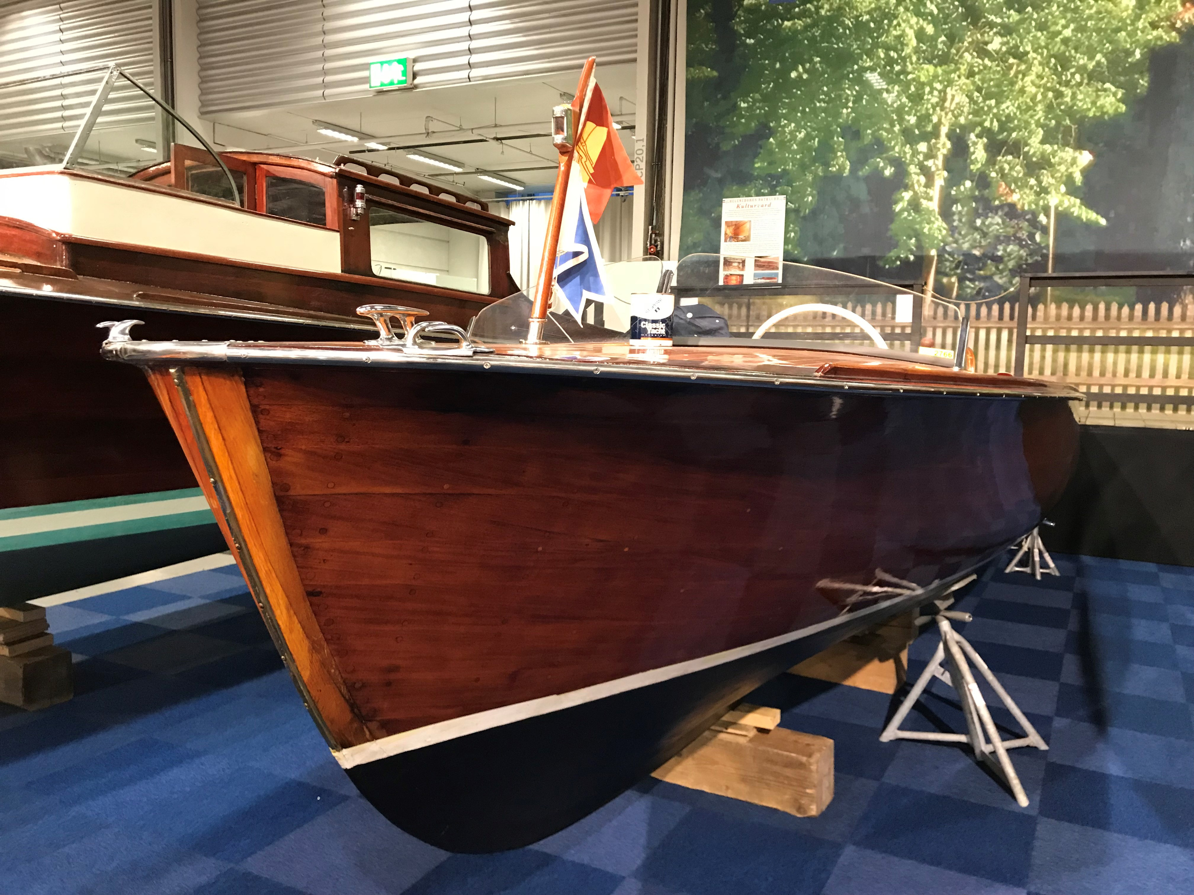 Racern Burmeister från 1956 i Heleneborgs båtklubbs monter på båtmässan Allt för sjön 1-10 mars 2019 i Älvsjö. Konstruktör: Einar Runius. Byggare/varv; Westins varv, Mönsterås.